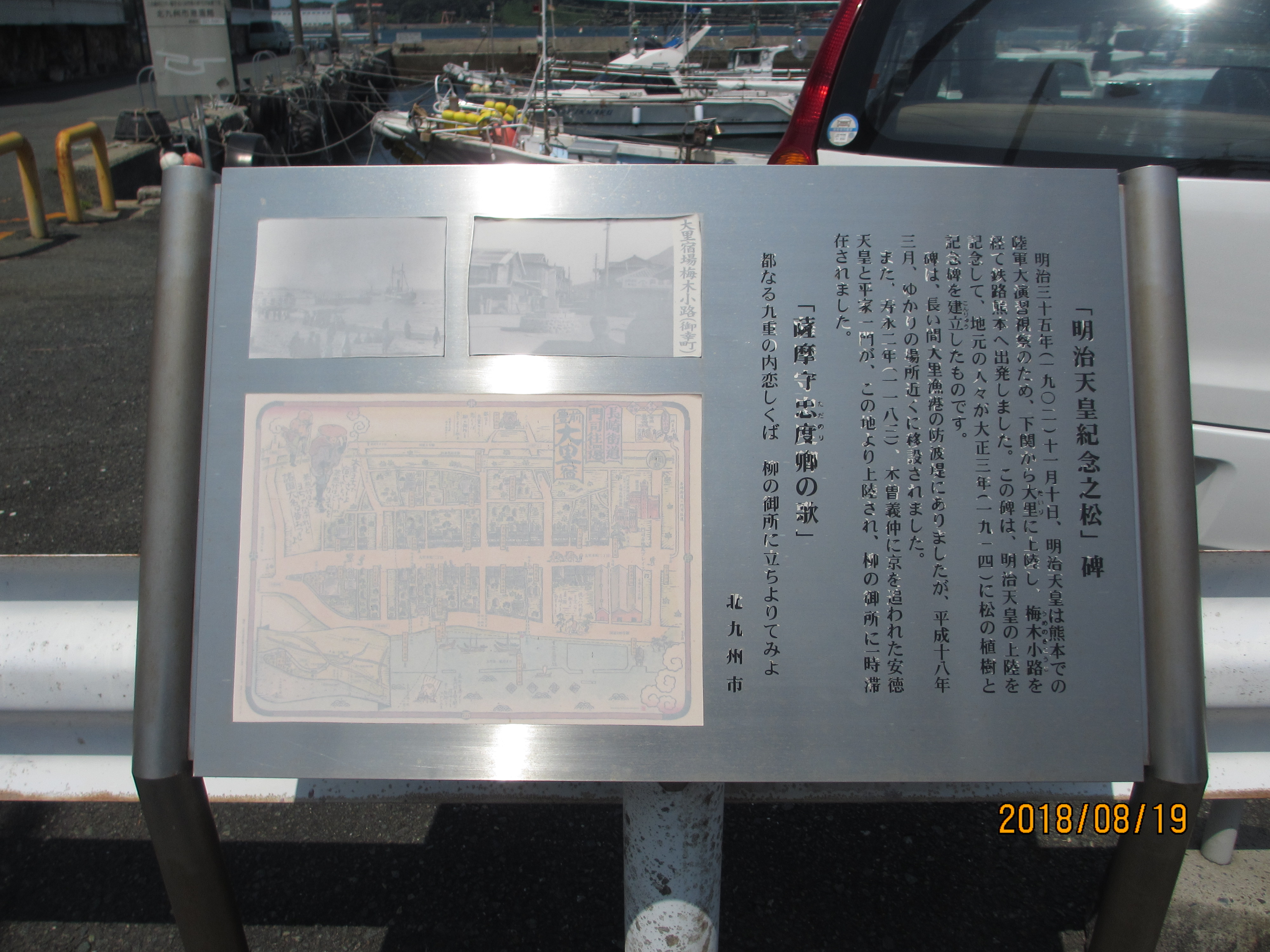 北九州市門司駅傍「明治天皇記念之松」碑と同じ板